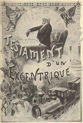 ilustrace Georga Rouxe z francouzského vydání románu J. Verna. The original description page was here. All following user names refer to cs.wikipedia.